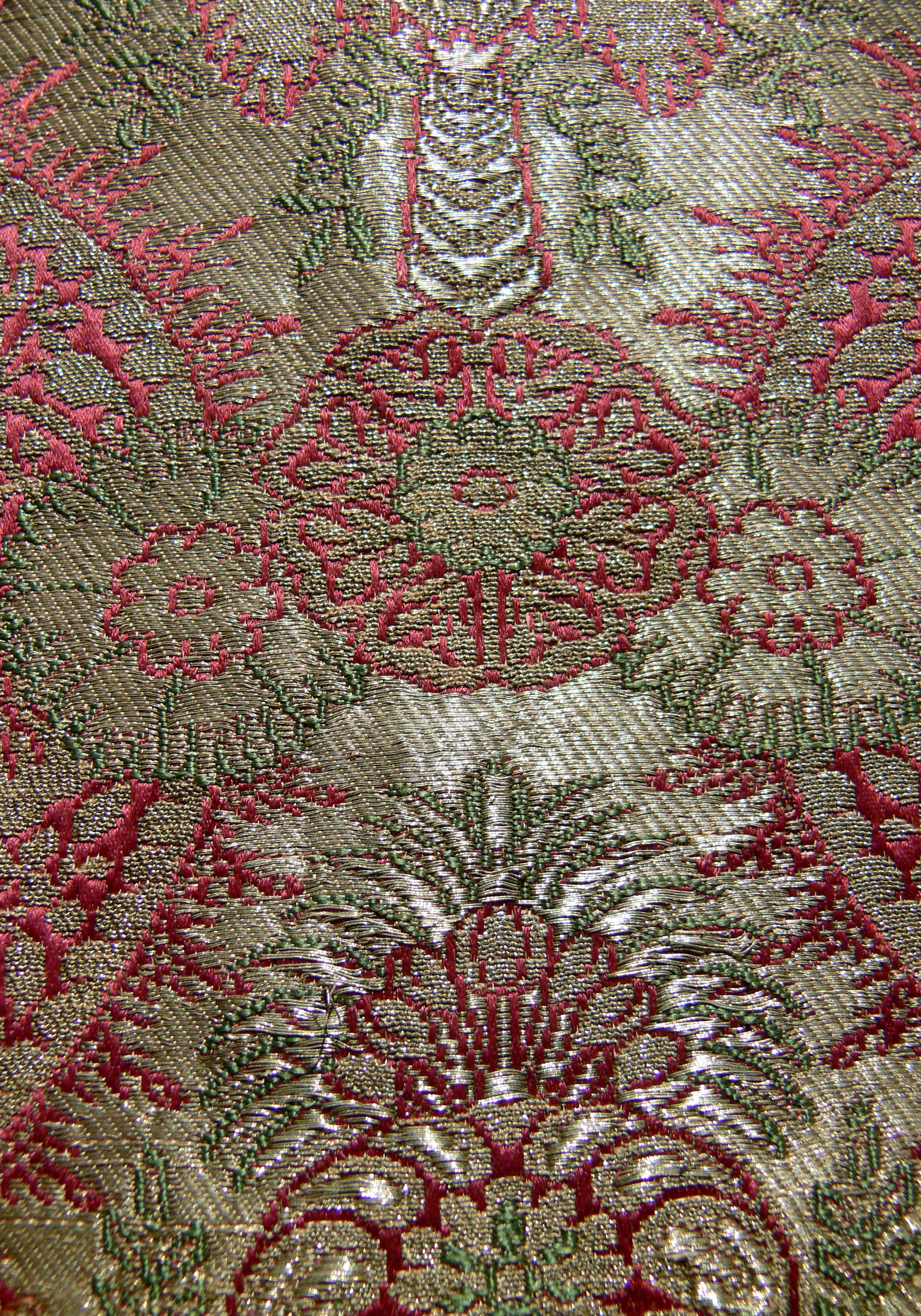 Diözesanmuseum Bamberg Rot-silberner Ornat, Lyon 1727, Brokat, Detail